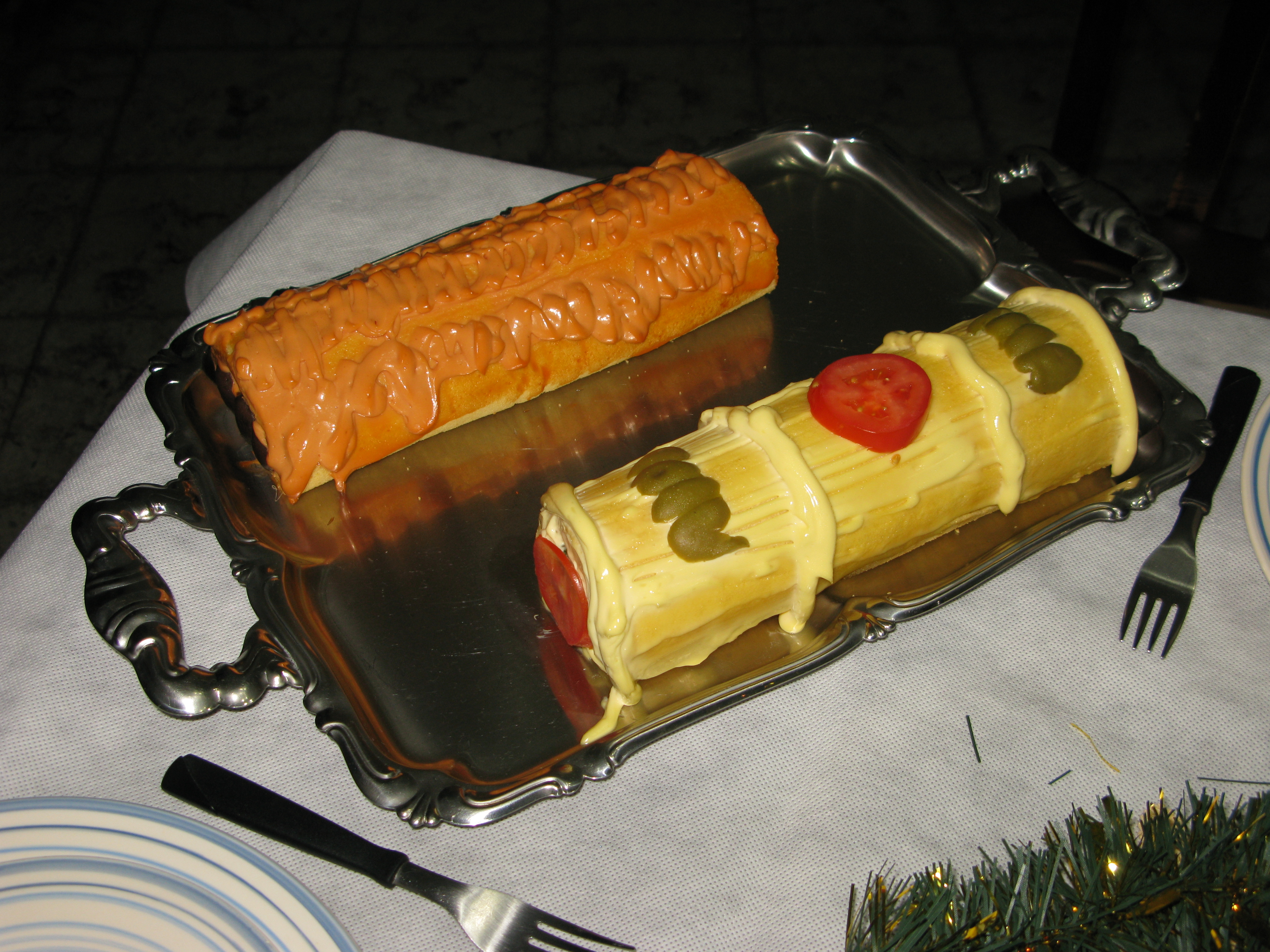 Piononos agridulces argentinos caseros